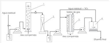 Evaluación de la fotodegradación sensibilizada con TiO2 Y Fe+3 para aguas coloreadas